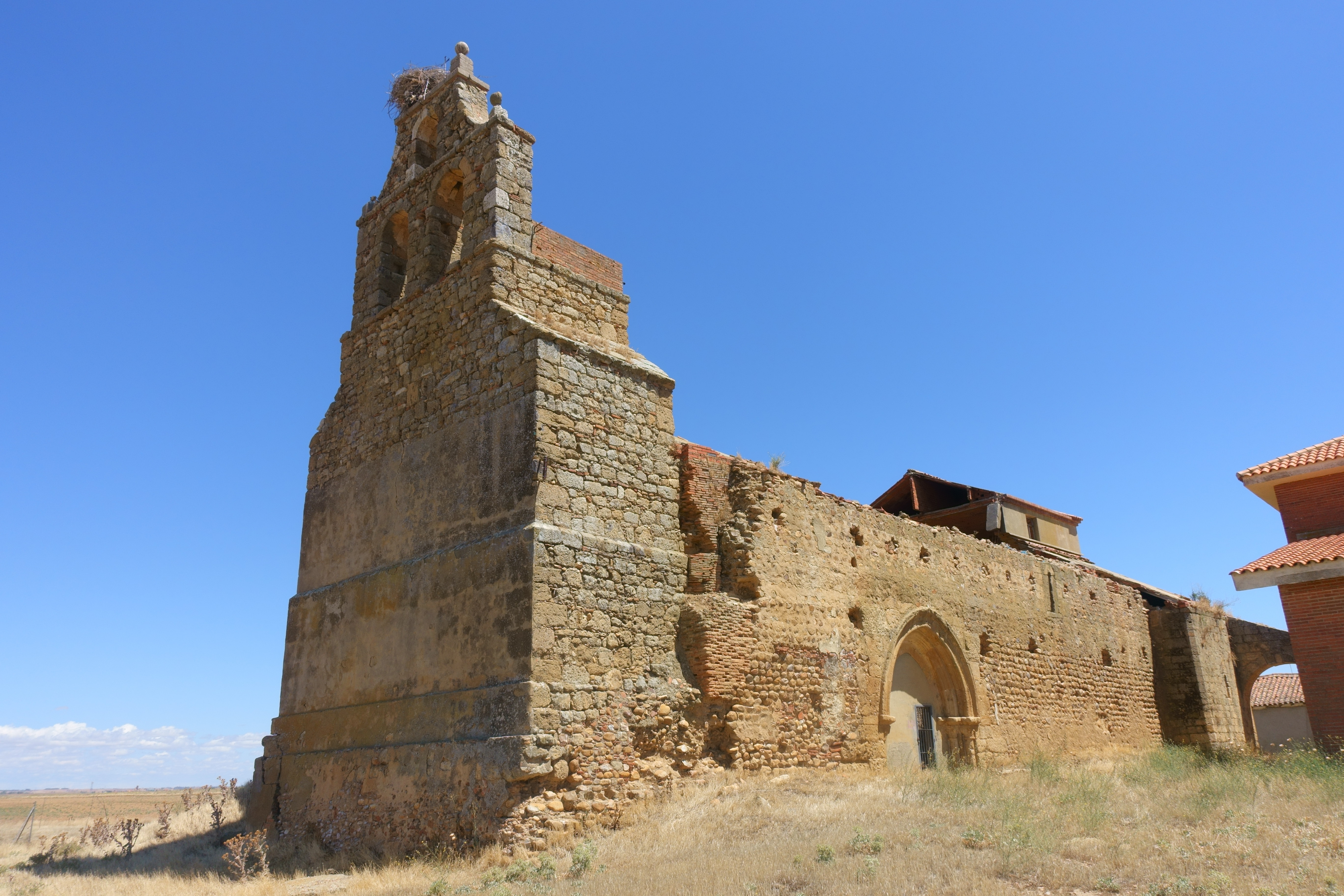 Iglesia de Santa María, Quintanilla del Monte (Zamora, España).